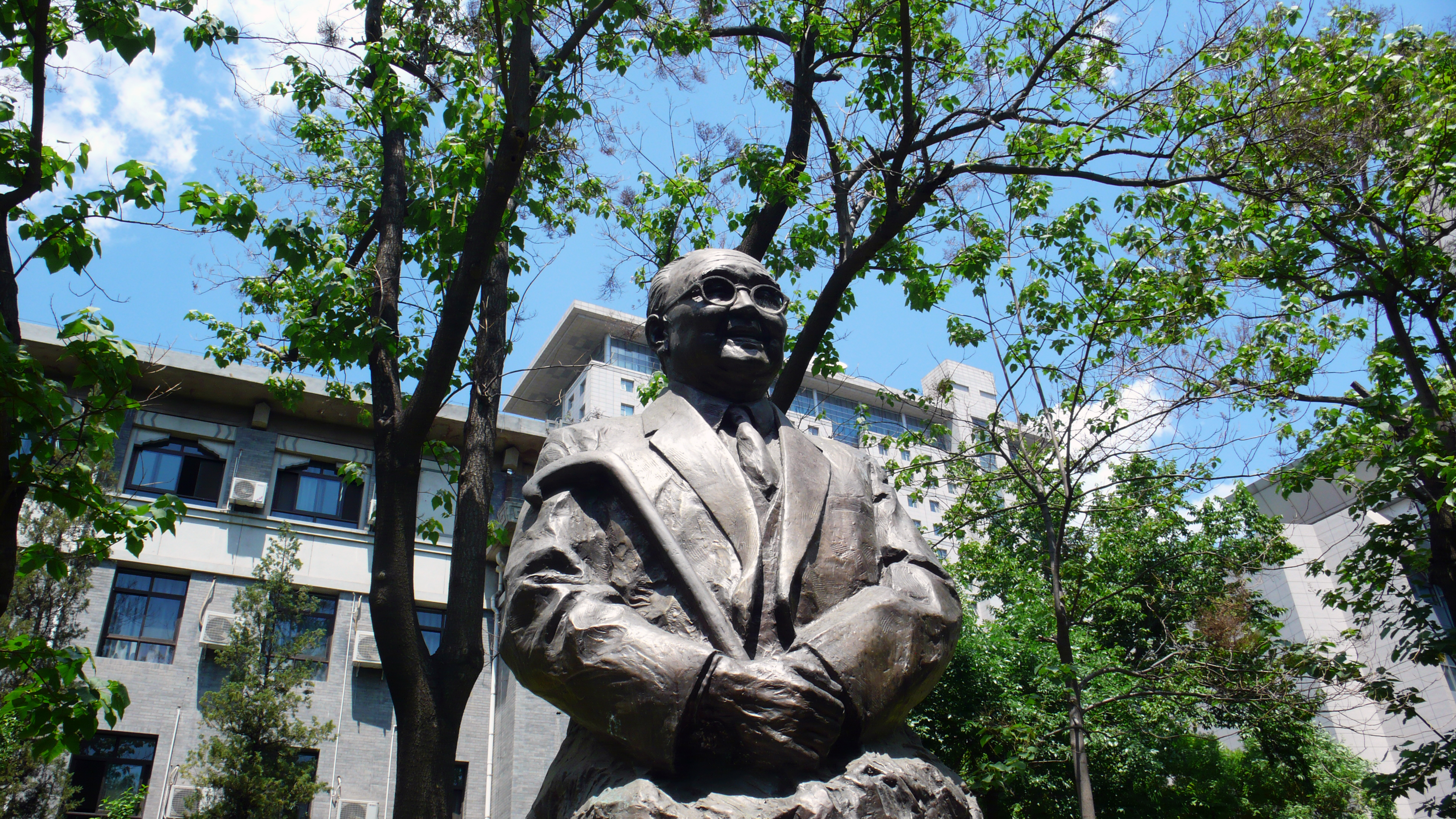 北师大启功像2。